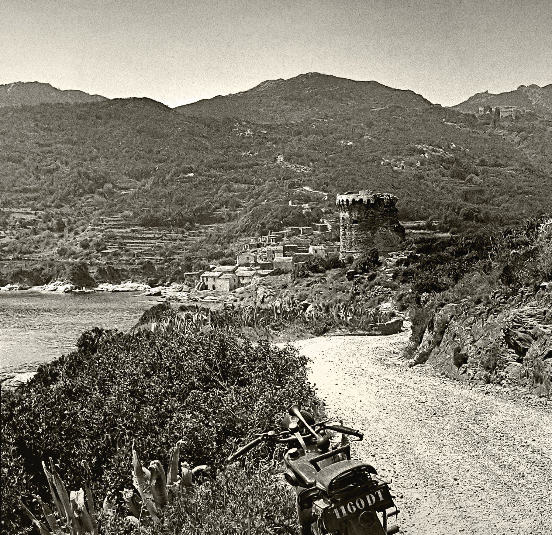 Meria (Corse) - La tour et la marine au début du XXe siècle. La moto est une Terrot 350 cm3 fabriquée dans les années 1929-1930 à Dijon